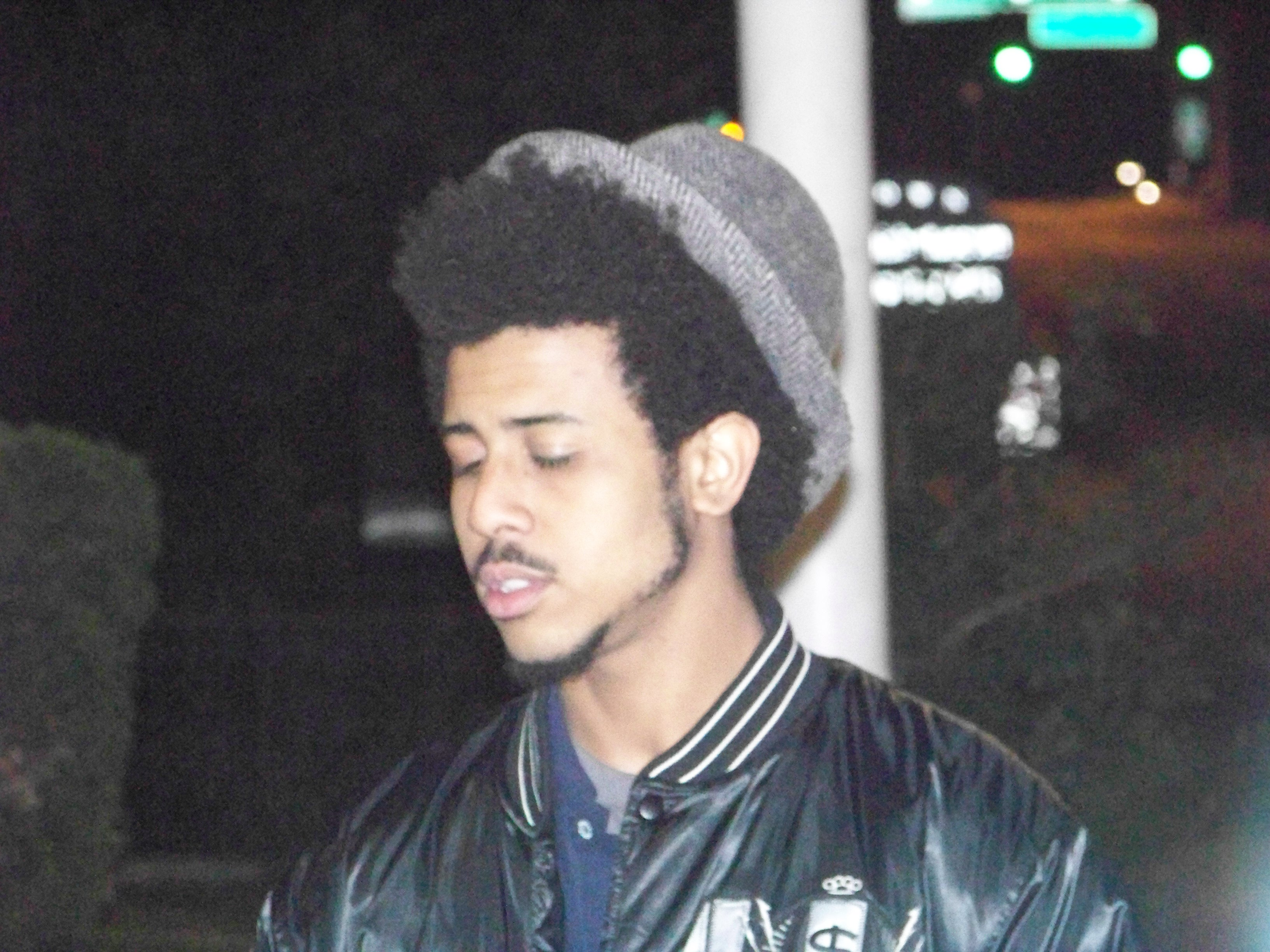 Rapper Blu getting interviewed in Atlanta, Georgia.